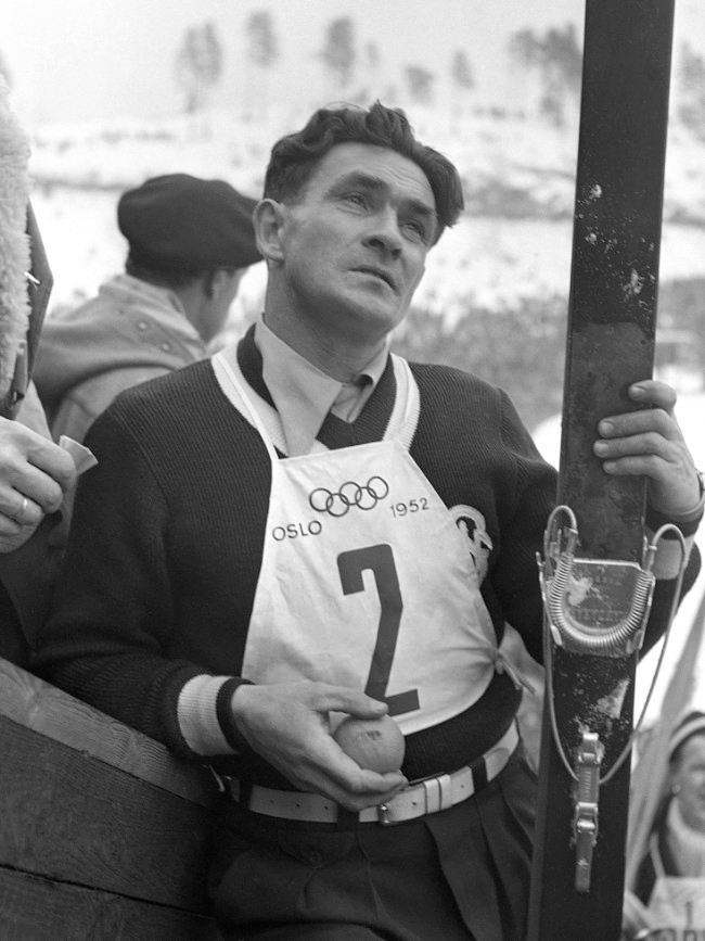 Simon Slåttvik at the Holmenkollen in 1952.